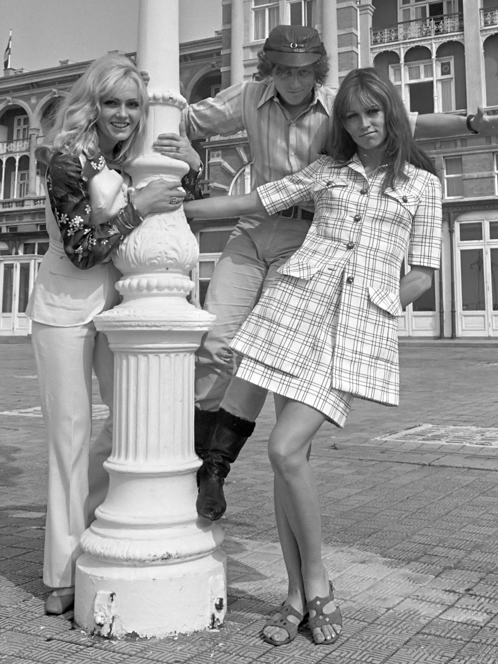 Singing Europe 1969 in Scheveningen. De "Golden Kids" uit Tsjechoslowakije op de boulevard van Scheveningen 4 juli 1969